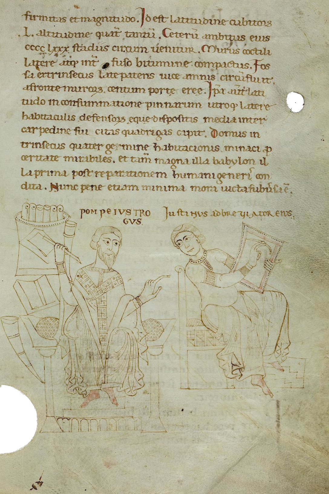 Pagina del Codice Palatino 927 realizzato presso lo scriptorium del monastero della Santissima Trinità in Monte Oliveto a Verona. Conservato presso la Biblioteca Apostolica Vaticana. Sono rappresentati lo storico Pompeo Trogo e l'abbreviatore Giustino